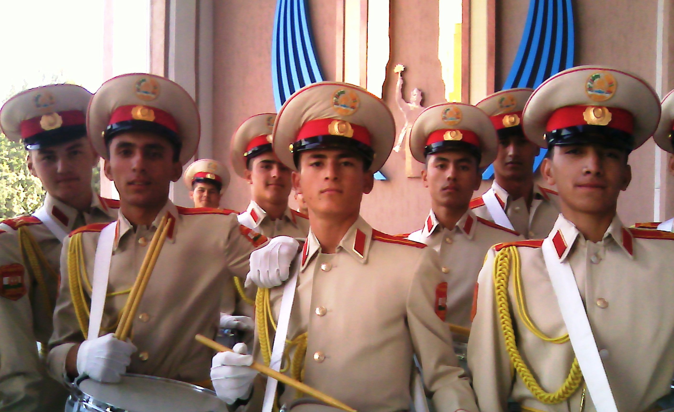 Суворовцы Таджикистана. Портрет курсантов суоровской школы